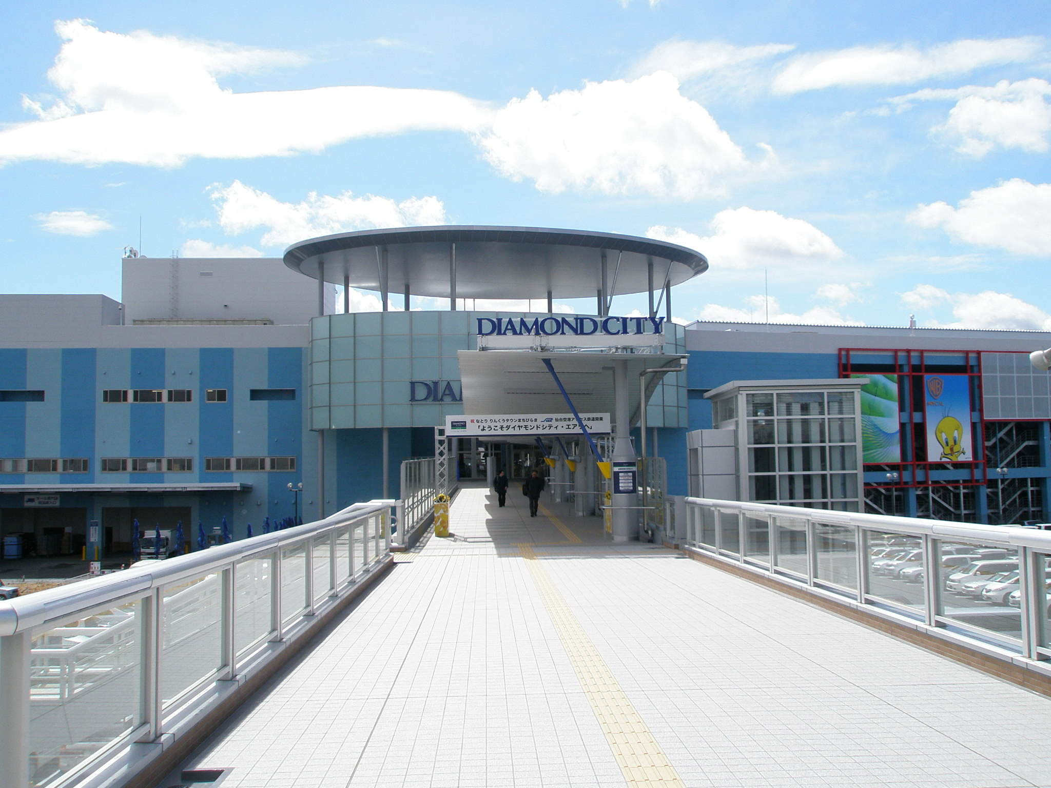 開業当初のダイヤモンドシティ・エアリ（現イオンモール名取、宮城県名取市）入口の様子（2007年3月20日）。仙台空港アクセス鉄道の杜せきのした駅とペデストリアンデッキで接続されている。ダイヤモンドシティ・エアリは、運営会社のダイヤモンドシティがイオンモール株式会社に吸収合併された（2007年）ことで開業初年度の内にイオンモール名取エアリへと改称。2011年には「エアリ」も外され、現在のイオンモール名取となった。